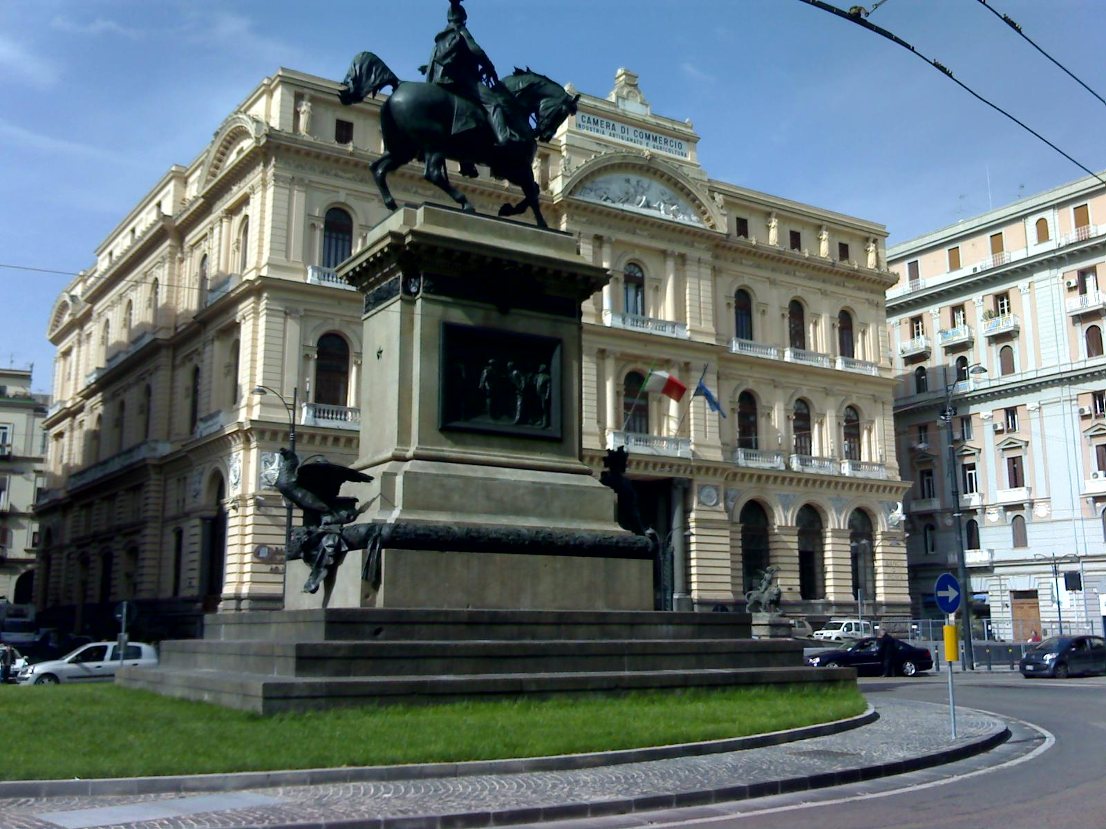 Piazza Giovanni Bovio (ex piazza Borsa). Dopo il rifacimento della piazza con statua di Vittorio Emanuele II